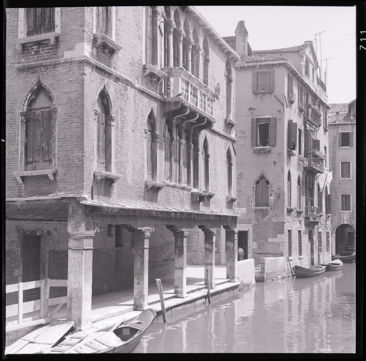 Servizio fotografico : Venezia, 1969 / Paolo Monti. - Buste: 1, Fototipi: 9 : Negativo b/n, gelatina bromuro d'argento/ pellicola ; 6x6. - ((Serie costituita da 1 contenitore portanegativi con 3 strisce di negativi identificabili con i nn.: 19211, 19212, 19213, 19214, 19215, 19216, 19217, 19218, 19219 (non è però possibile identificarli singolarmente non essendoci scritti i numeri in corrispondenza del singolo negativo). - Occasione: Documentazione per la pubblicazione: Arslan Edoardo, "Venezia gotica: architettura civile gotica veneziana", Milano, Electa, 1970. - Fonte: Monografia di Arslan, Edoardo: Venezia gotica: architettura civile gotica veneziana, Milano, Electa (1970)